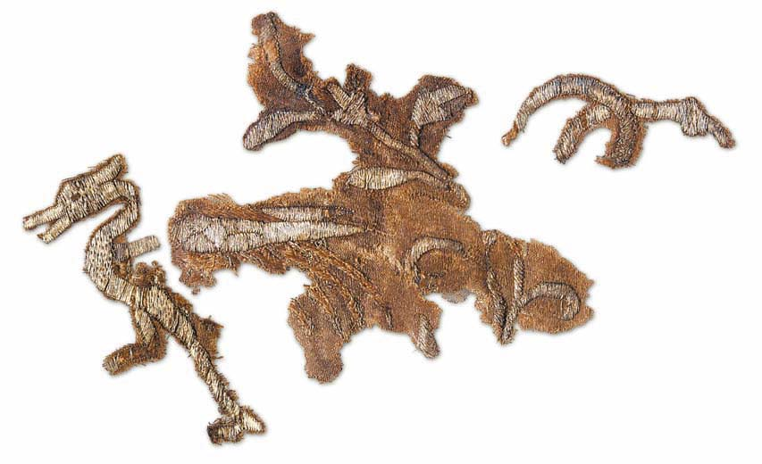 Остатак тканине рађене у златовезу